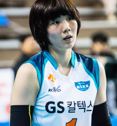 눈이 즐거웠던 챔피언결정전